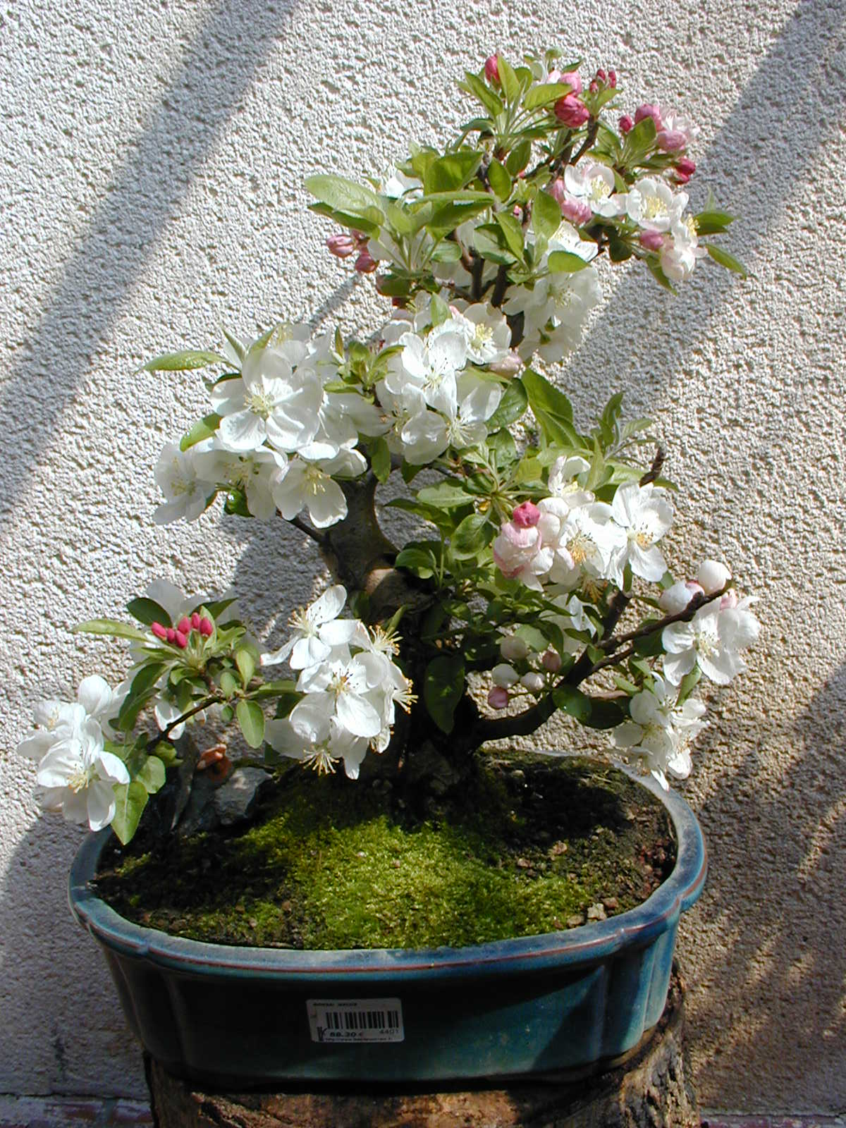 20040413 Bonzaï 14 Cette photographie de plante a été prise par Utilisateur:Semnoz le 13 avril 2004, à la Bambouseraie de Prafrance à Anduze (Gard) et placée sous licence GFDL Photo of plant, taken by wiki-french-user Semnoz in April 2004, and placed with GFDL licence. Utilisateur:Semnoz 13 avril 2004